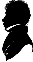 silhouet van Raombana